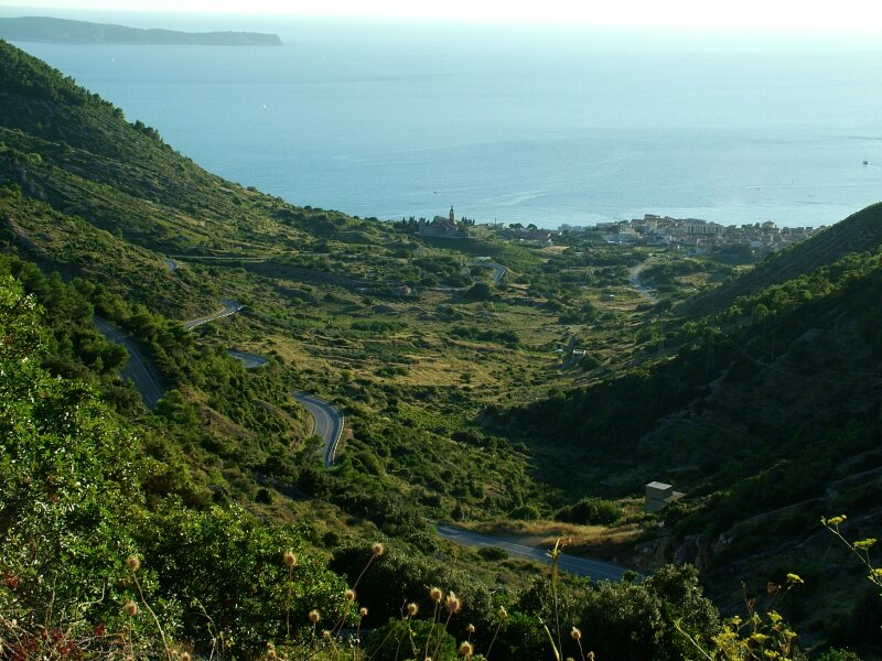 Najbardziej stromy fragment drogi 6212, w dole Komiža, zatoka Komiža , po lewej u gory - fragment wyspy Biševo.